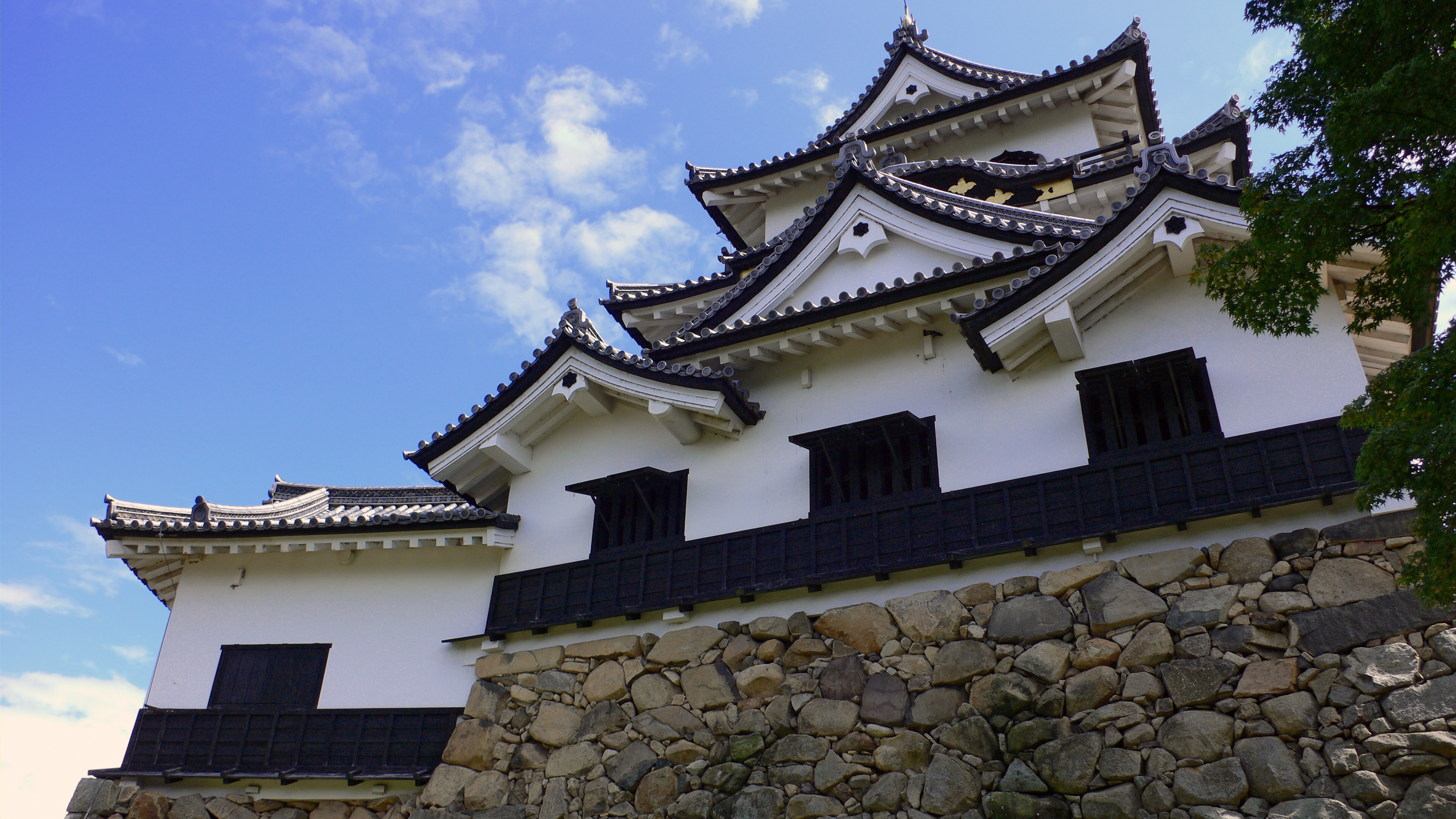 Hikone Castle in Hikone, Shiga, Japan